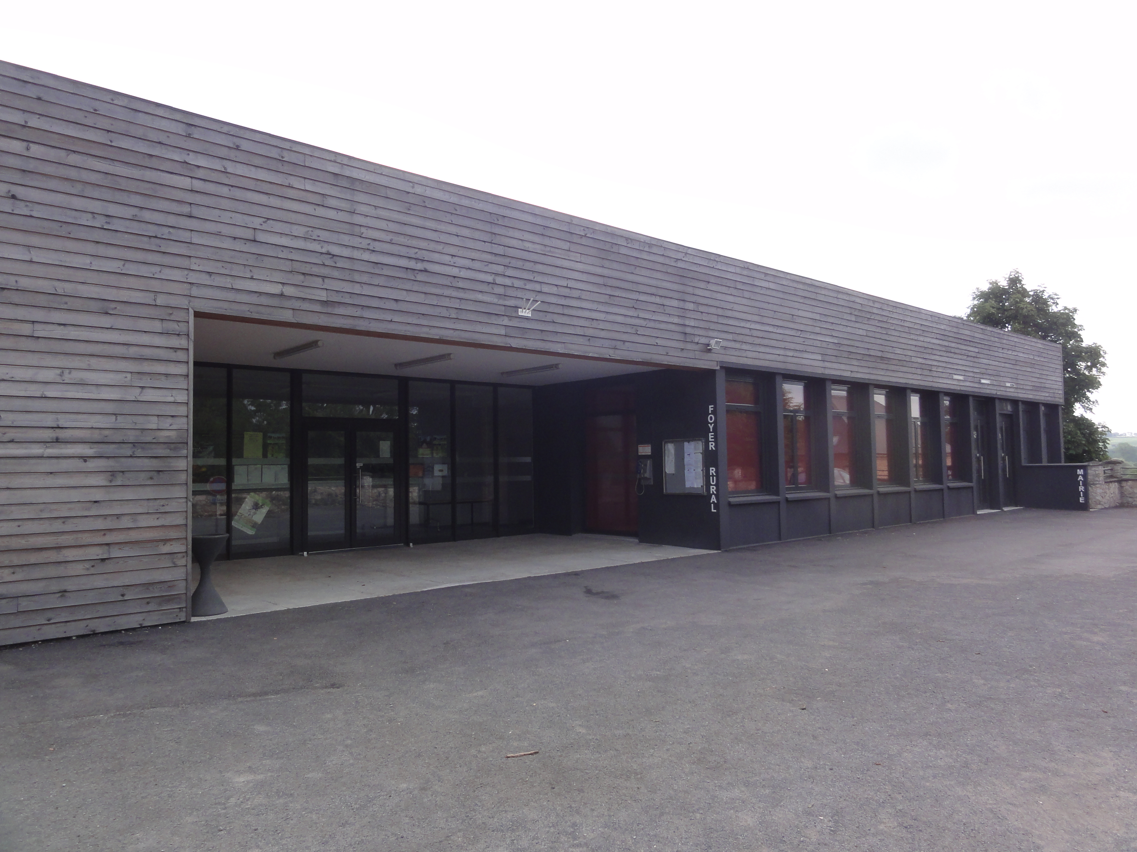 Erloy (Aisne), mairie et foyer rural.